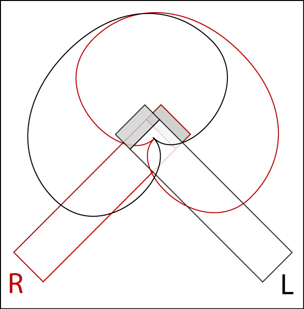 XY stereo